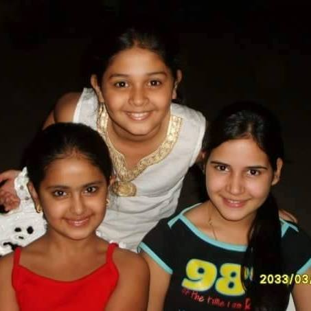 Đạo diễn Sidharth Sengupta và các diễn viên Avika Gor (Anandi), Faiza Faiz (Phooli), Shivshakti Sachdev (Champa) phim Cô dâu 8 tuổi